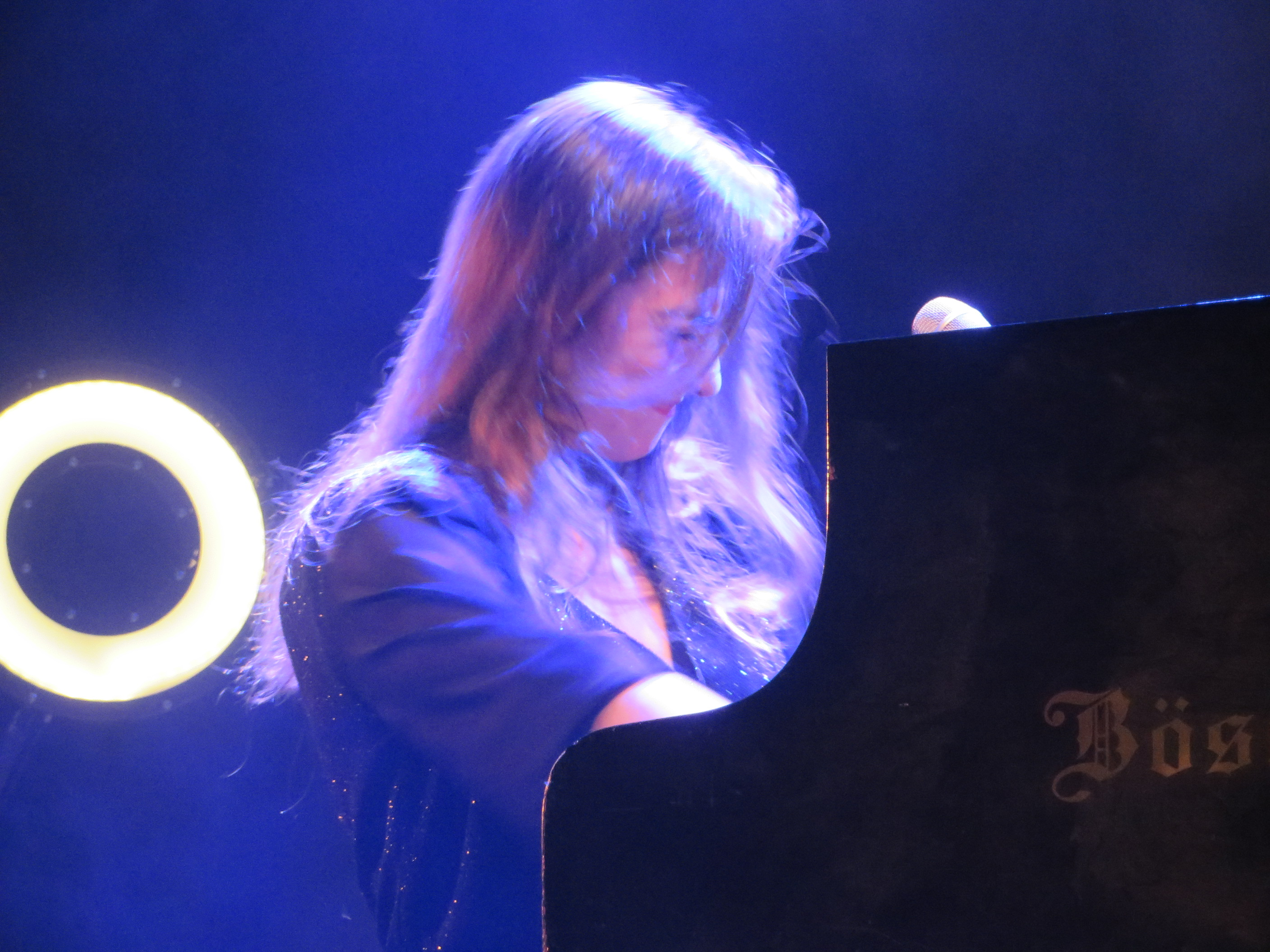 תמונה מתוך הופעה של קרן פלס בחיפה בתאריך 3.1.15